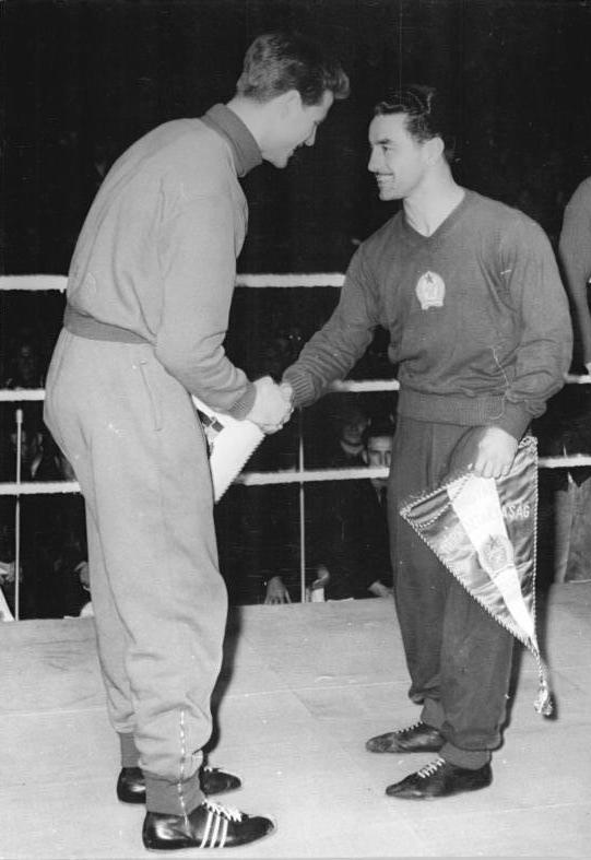 Ullrich Nitzschke, Laszlo Papp Zentralbild Funck 10.12.1955 Ungarischer Boxsieg gegen DDR. In der Leipziger Messehalle II standen sich am Freitag, dem 9. Dezember 1955, im Boxländerkampf die Staffeln der DDR und Ungarn gegenüber. Die Gäste kamen dabei im Gesamtergebnis zu einem 14:6 Erfolg. UBz: . Die beiden Mannschaftsführer Laszlo Papp (Ungarn, rechts) und Ullrich Nitzschke begrüßen sich vor der offiziellen Eröffnung und tauschen Wimpel aus.